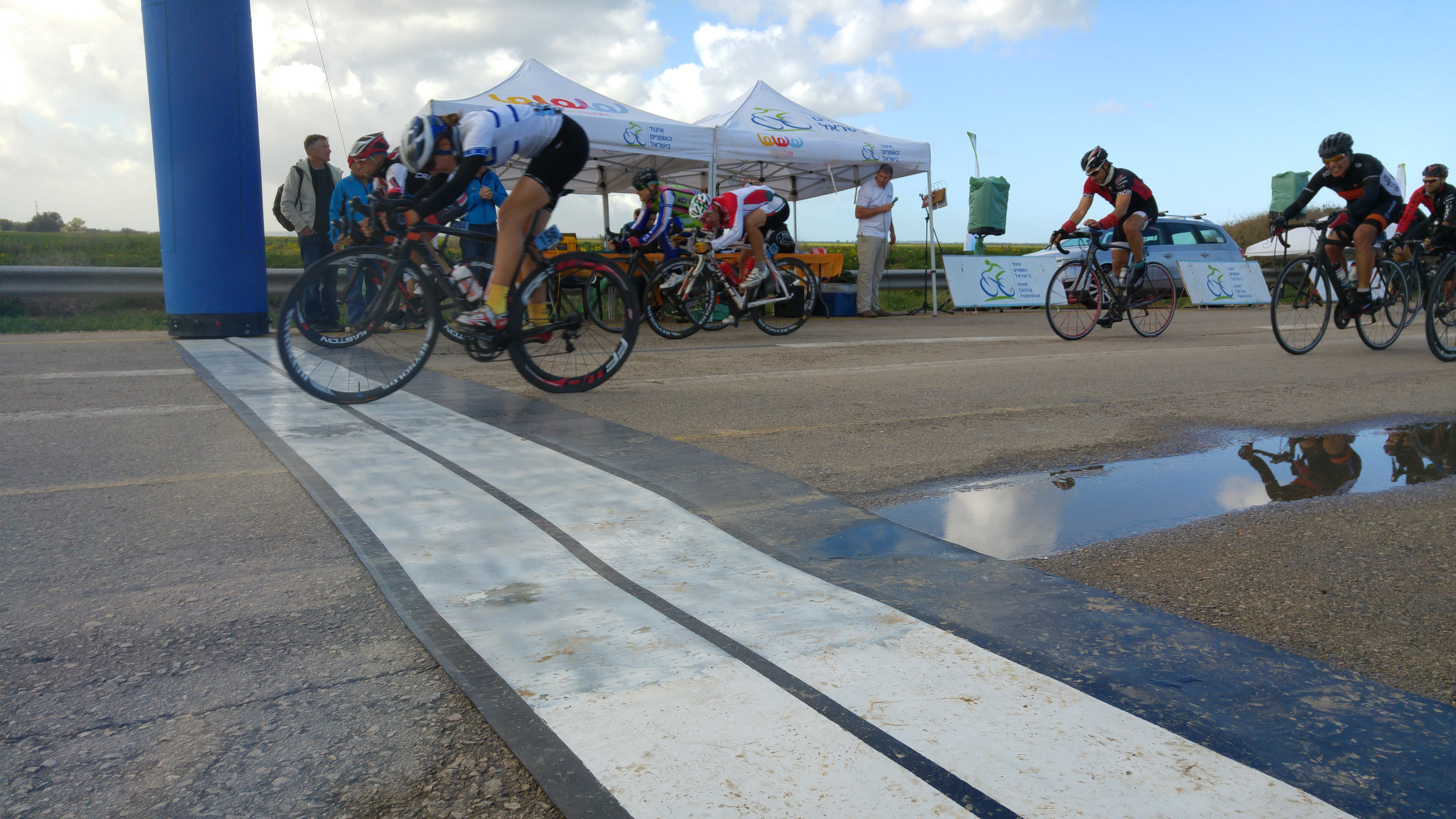 רותם גפינוביץ חוצה את קו הסיום ומנצחת בקטגוריית עילית נשים במרוץ אורים - מרוץ פתיחת עונת 2016 באופני כביש בישראל